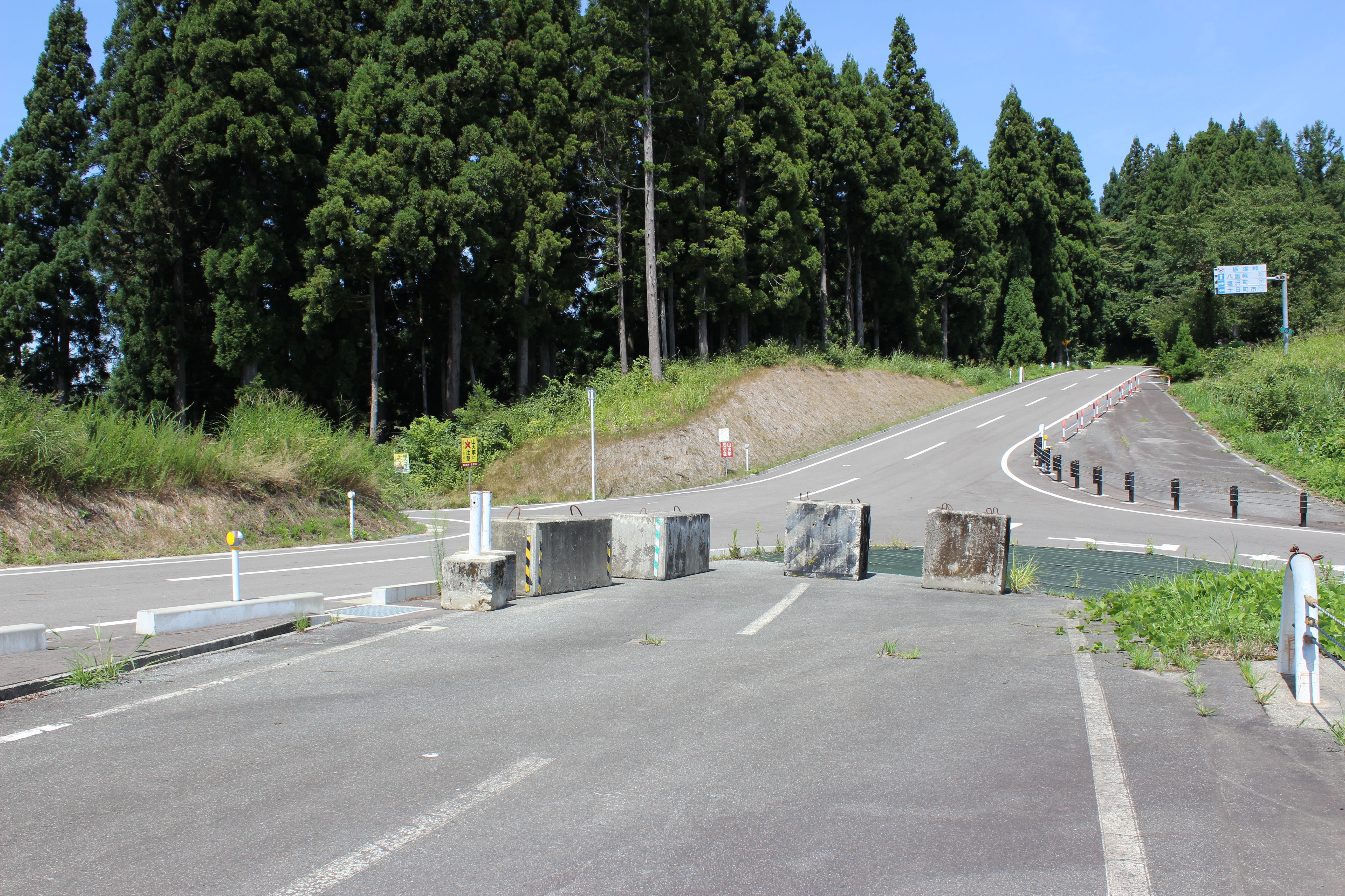 魚沼スカイラインの栃窪峠交差点より北方向。